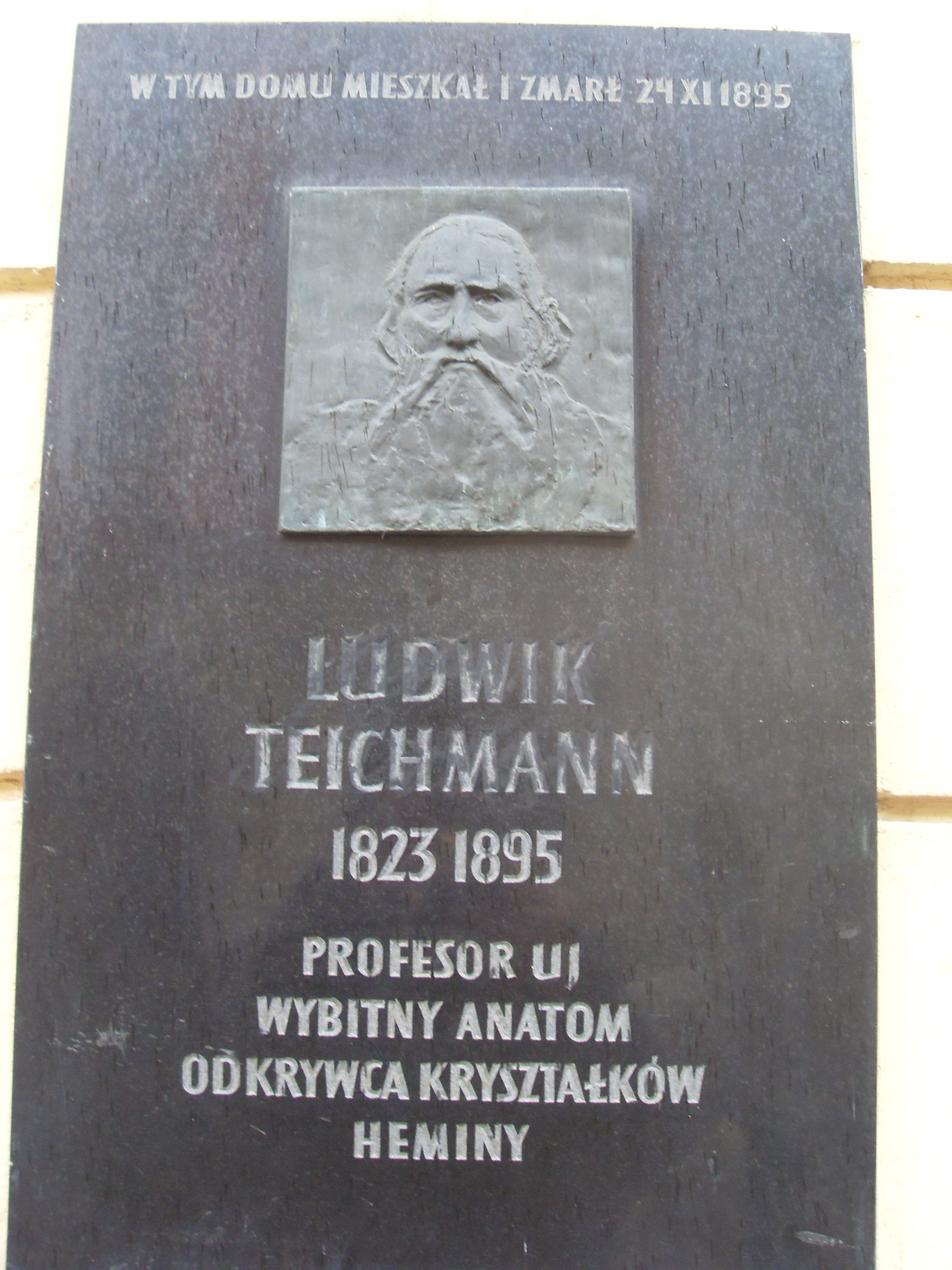 Tablica pamiątkowa ku czci L. Teichmanna na kamienicy przy ul. Floriańskiej w Krakowie.